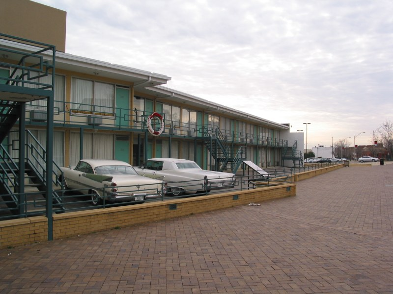 Lorraine Motel, Balkon auf dem Martin Luther King erschossen wurde.